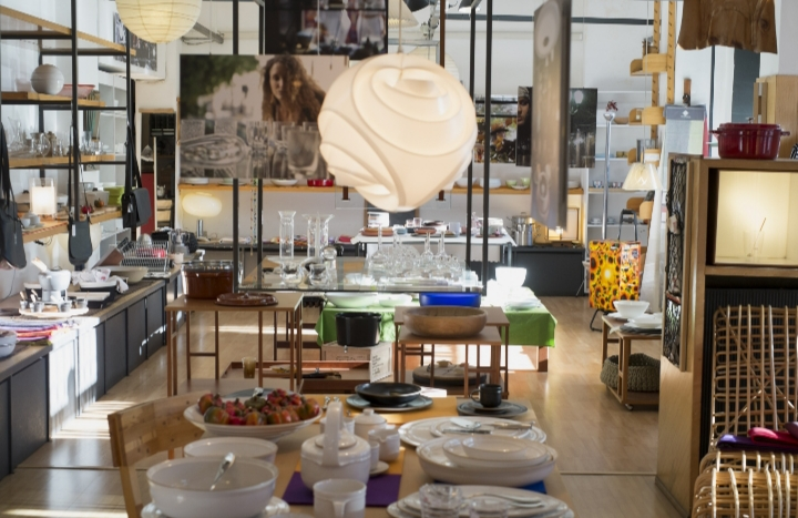 Interni negozio Arfom in via della Moscova in centro a Milano